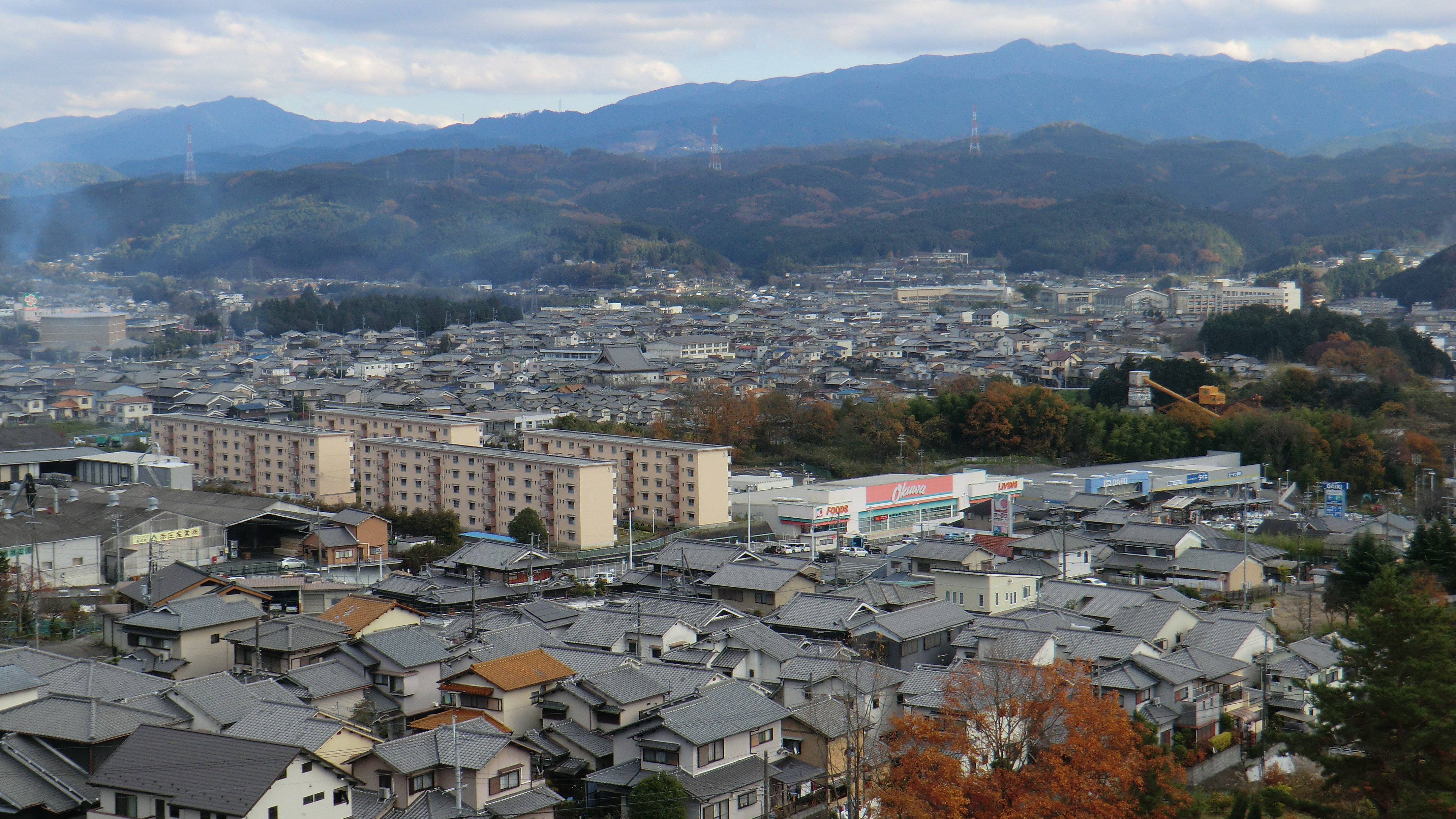 奈良県大淀町下渕周辺 (車坂峠・香梨台付近より望む)